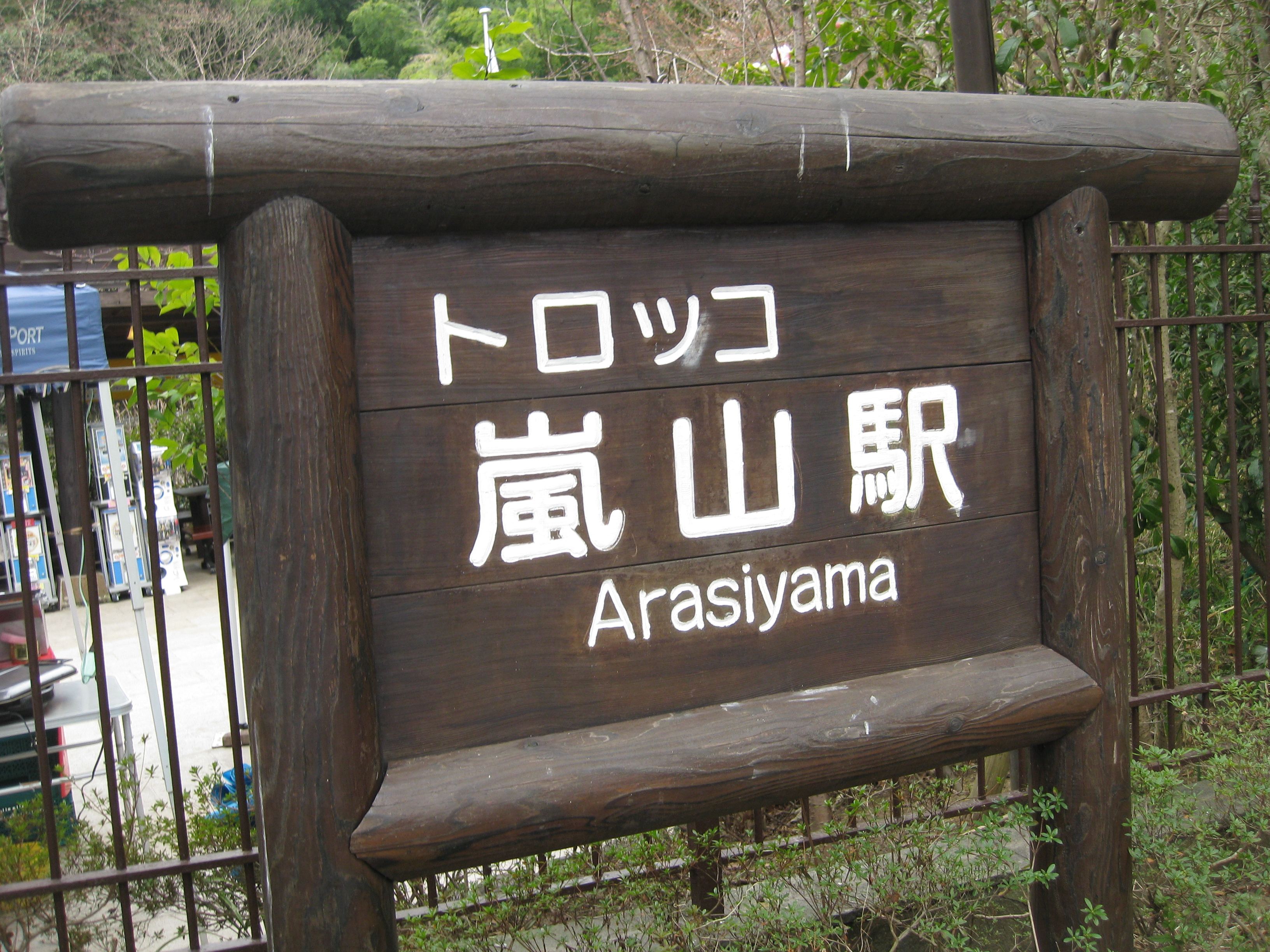 トロッコ嵐山駅の駅前にある木製の駅名標。